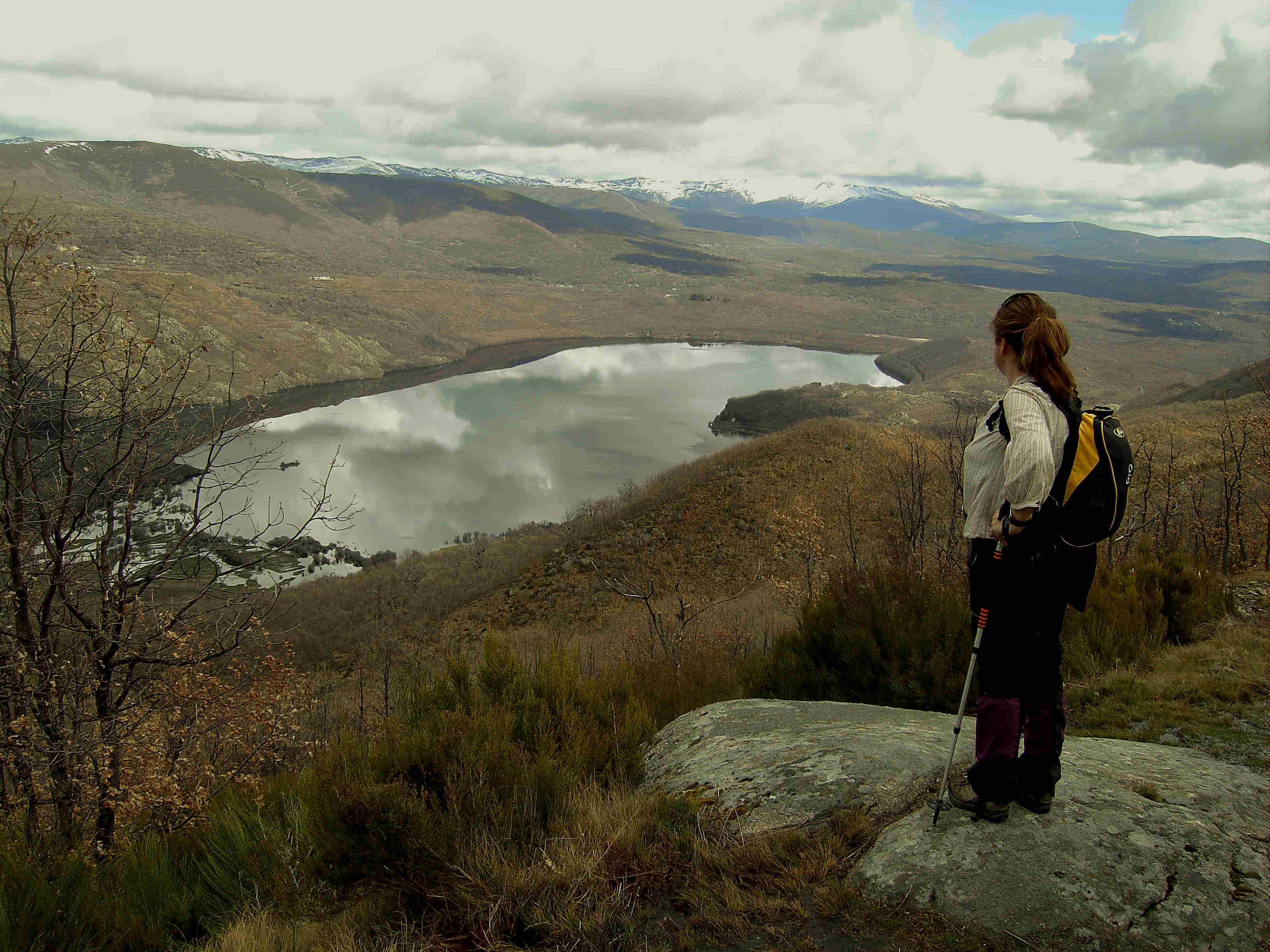 Vista desde el Oeste del Lago de Sanabria. Camino del Cordel Sanabrés.